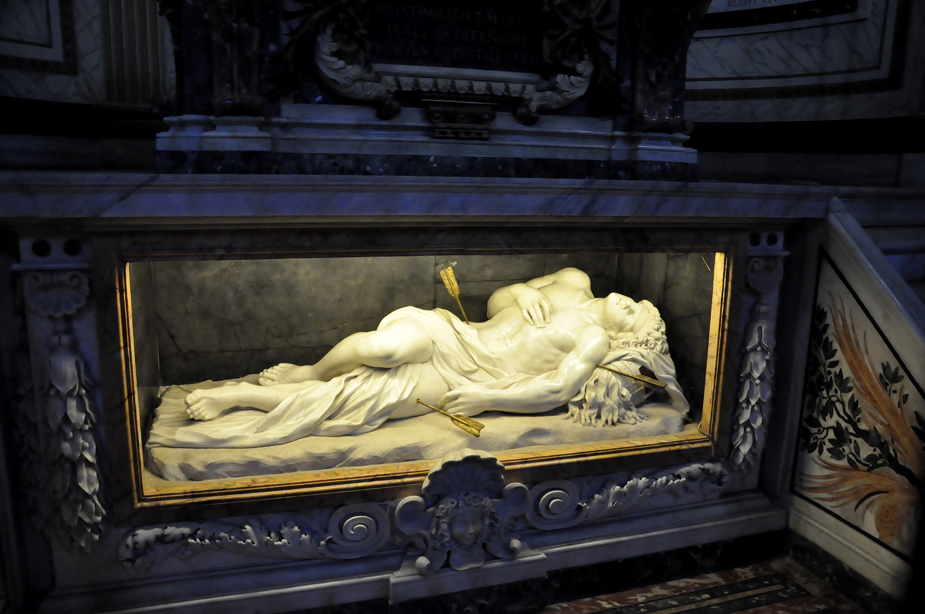 Het grafmonument van Sebastiaan boven zijn graf door Giuseppe Giorgetti (c.1671-72) in de Sint Sebastiaan buiten de Muren, langs de Via Appia in Rome